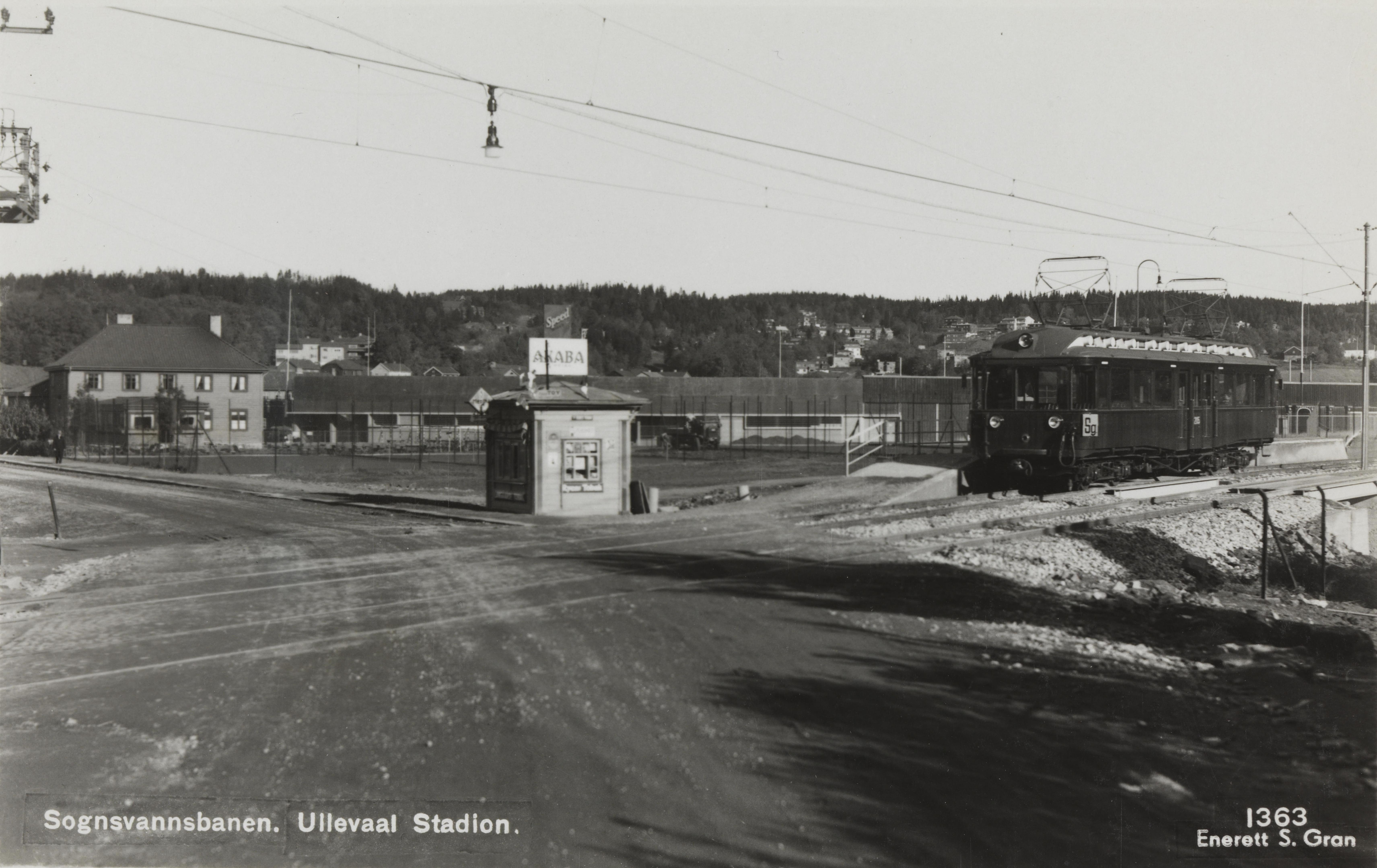 Bildet er hentet fra Nasjonalbibliotekets bildesamling Ullevål,Ullevål stasjon, Oslo, Oslo